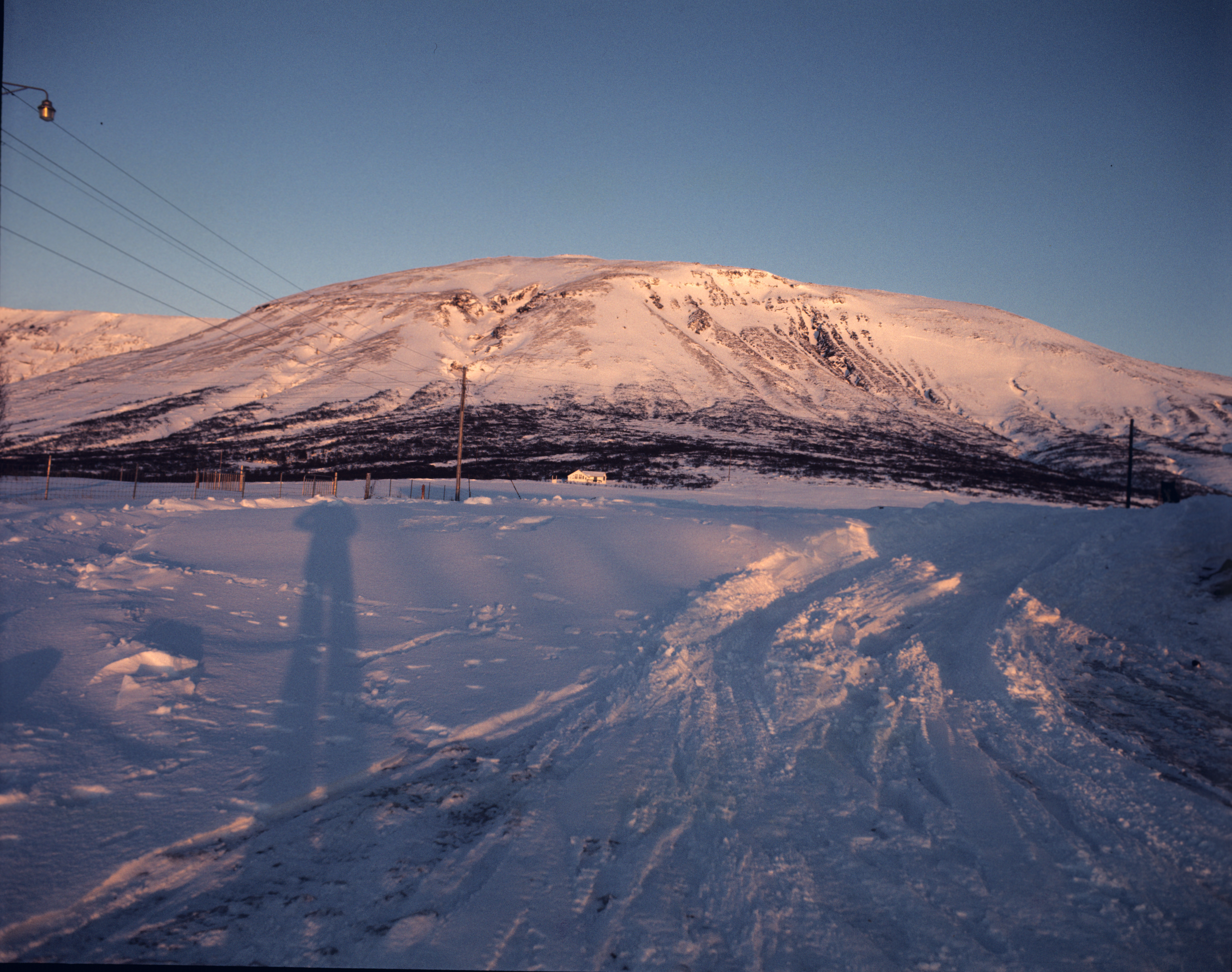 Laugarvatnsfjall bei Laugarvatn